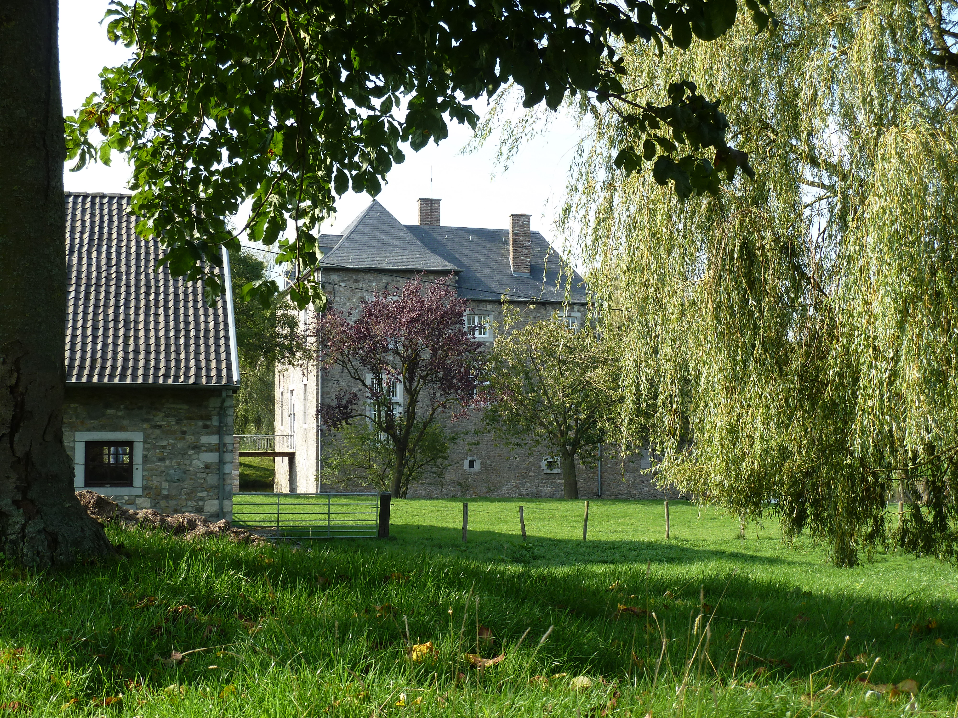 Château de Vieljaeren, Hombourg, Belgique